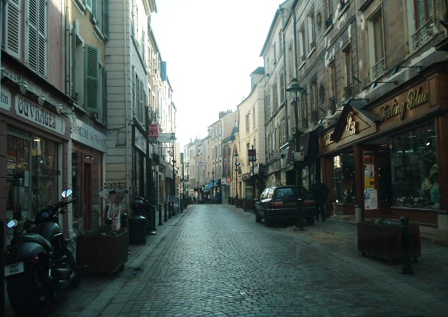 Rue Saint-Spire de Corbeil-Essonnes (Essonne, Île-de-France, France).